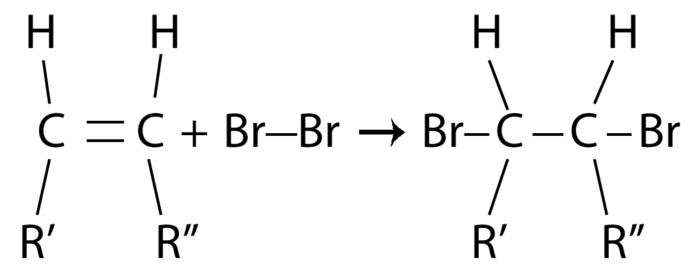 Additionsreaktion mellem triglycerid og bromvand